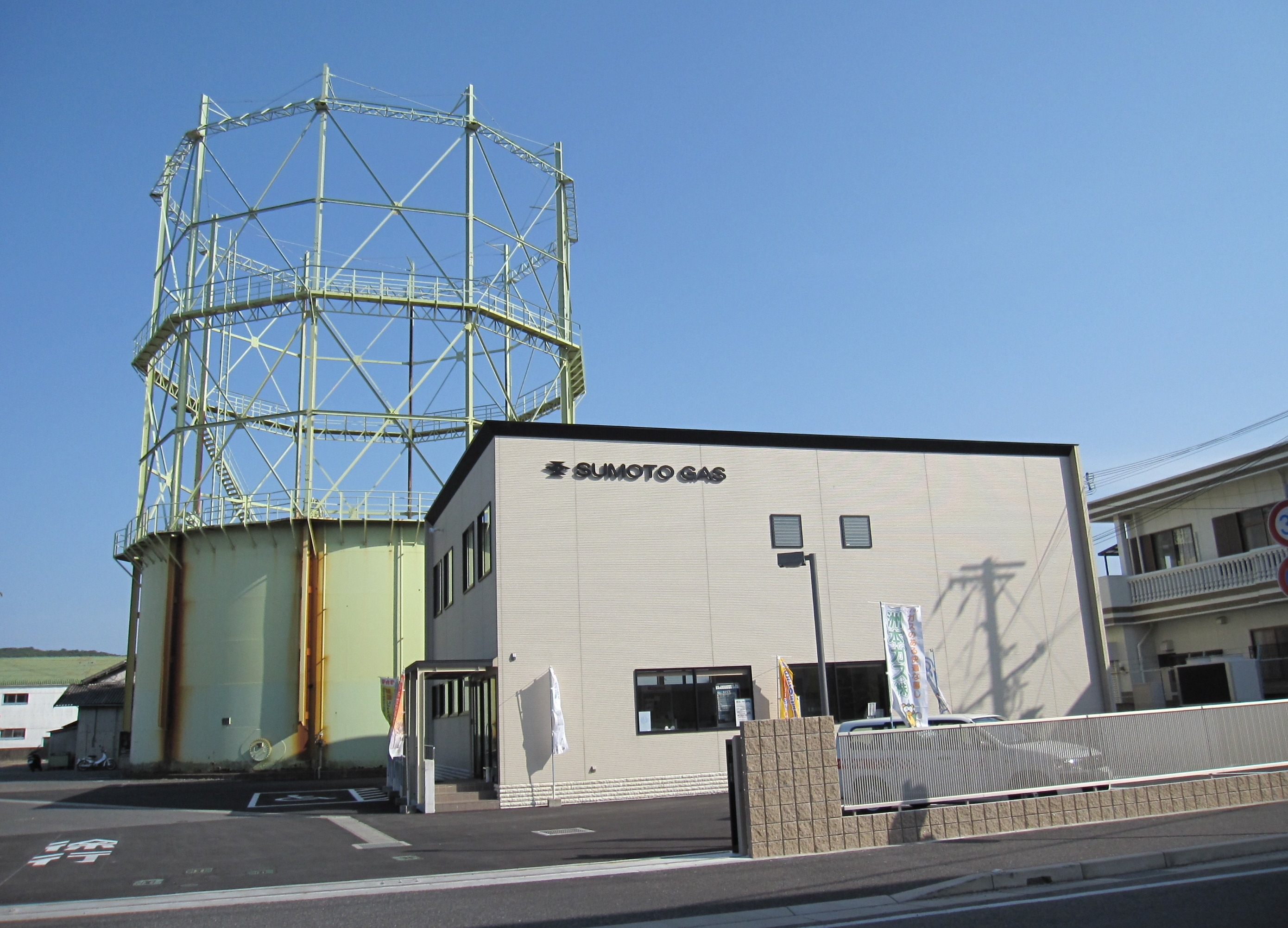 洲本ガス本社